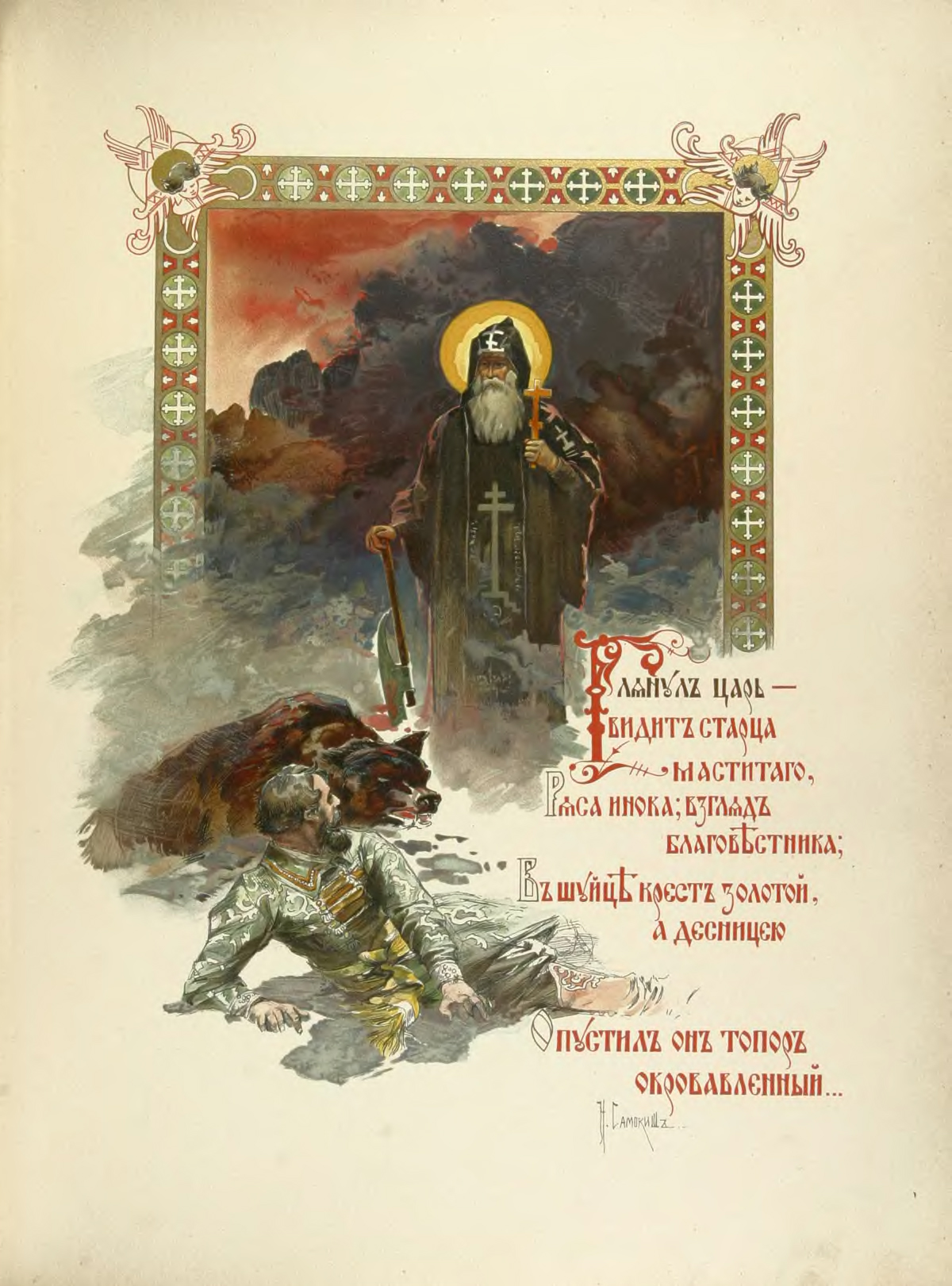 «Великокняжеская, царская и императорская охота на Руси» Н. И. Кутепова.